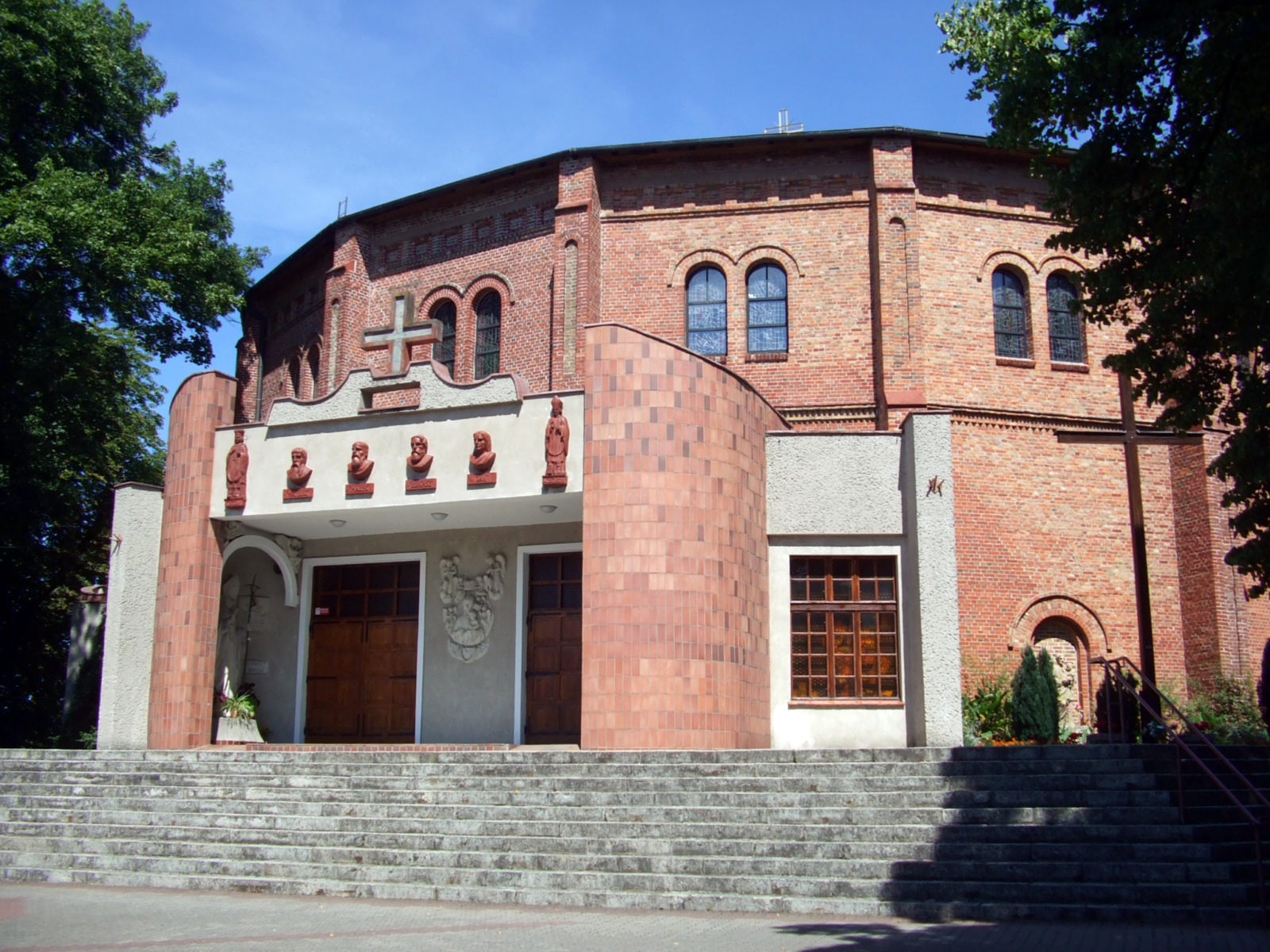 Kościół Matki Boskiej Jasnogórskiej w Szczecinie (zabytek nr rejestr. 405)